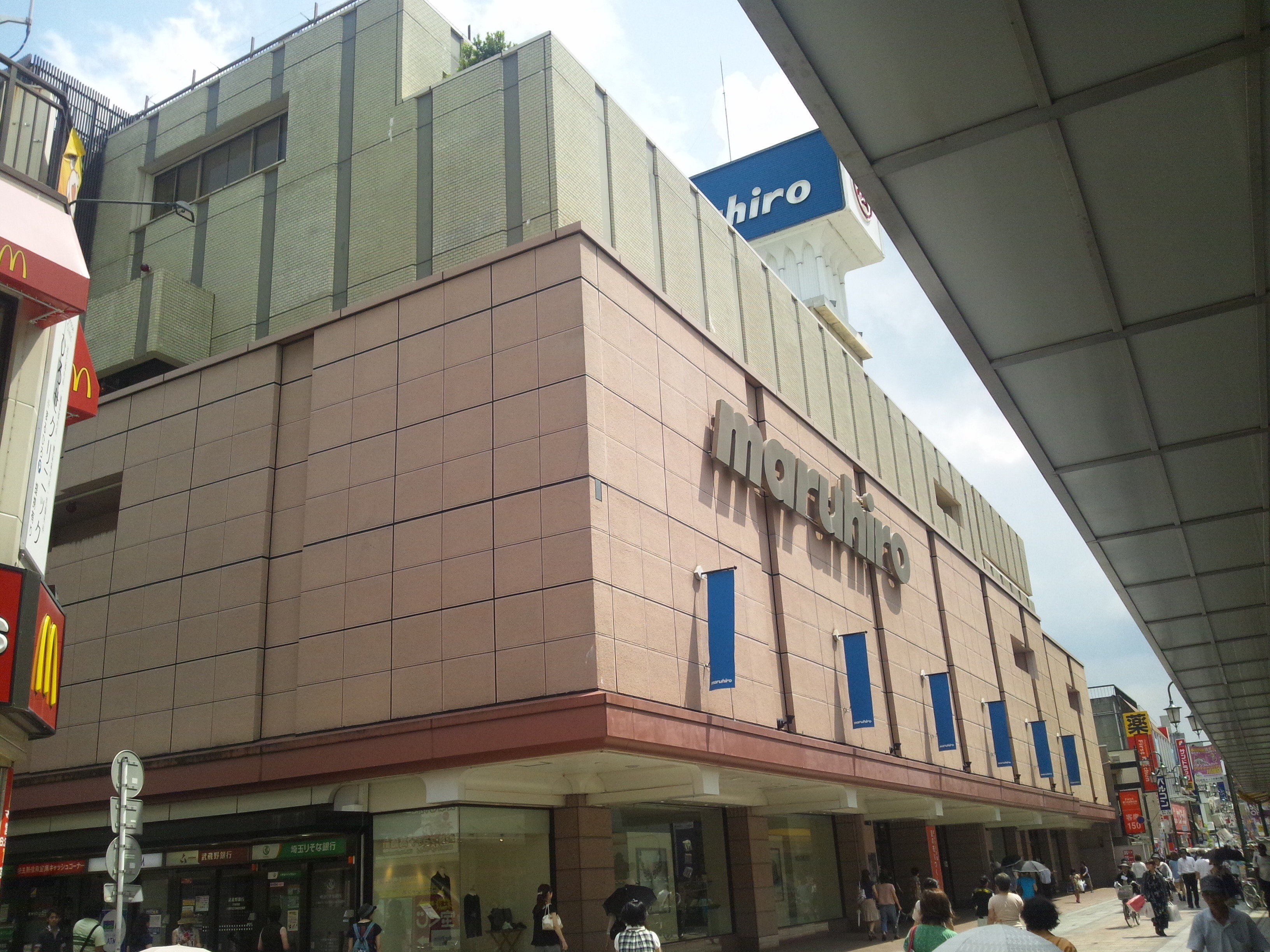 丸広本店クレアモール側入り口